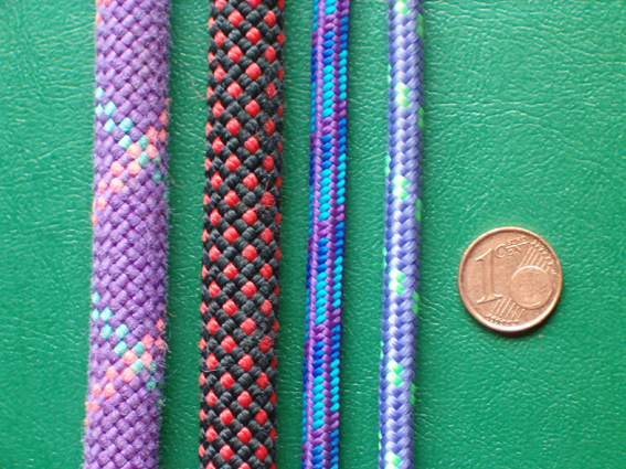 Klim- en prusiktouw naast elkaar in vergelijk met één eurocent - Klimmen/Materiaal